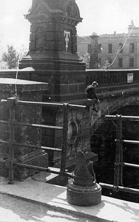 Berlin, Friedrichsbrücke, Ruine, Angler Friedrichsbrücke